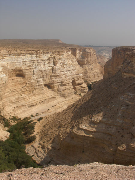 وادي عين عبده